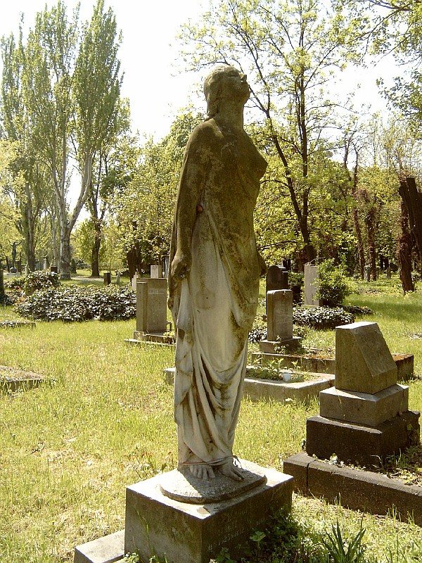 Gombaszögi Ella (Budapest, 1898. december 27. - Budapest, 1951. november 12.) színésznő sírja Budapesten. Kerepesi temető: 33-1-51/a [szobrász: Pásztor János].